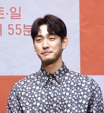 KBS 2TV 새 주말드라마 ‘사랑은 뷰티풀 인생은 원더풀’ (사풀인풀) 제작발표회가 25일 오후 서울시 구로구 라마다 서울 신도림 호텔에서 열렸다.